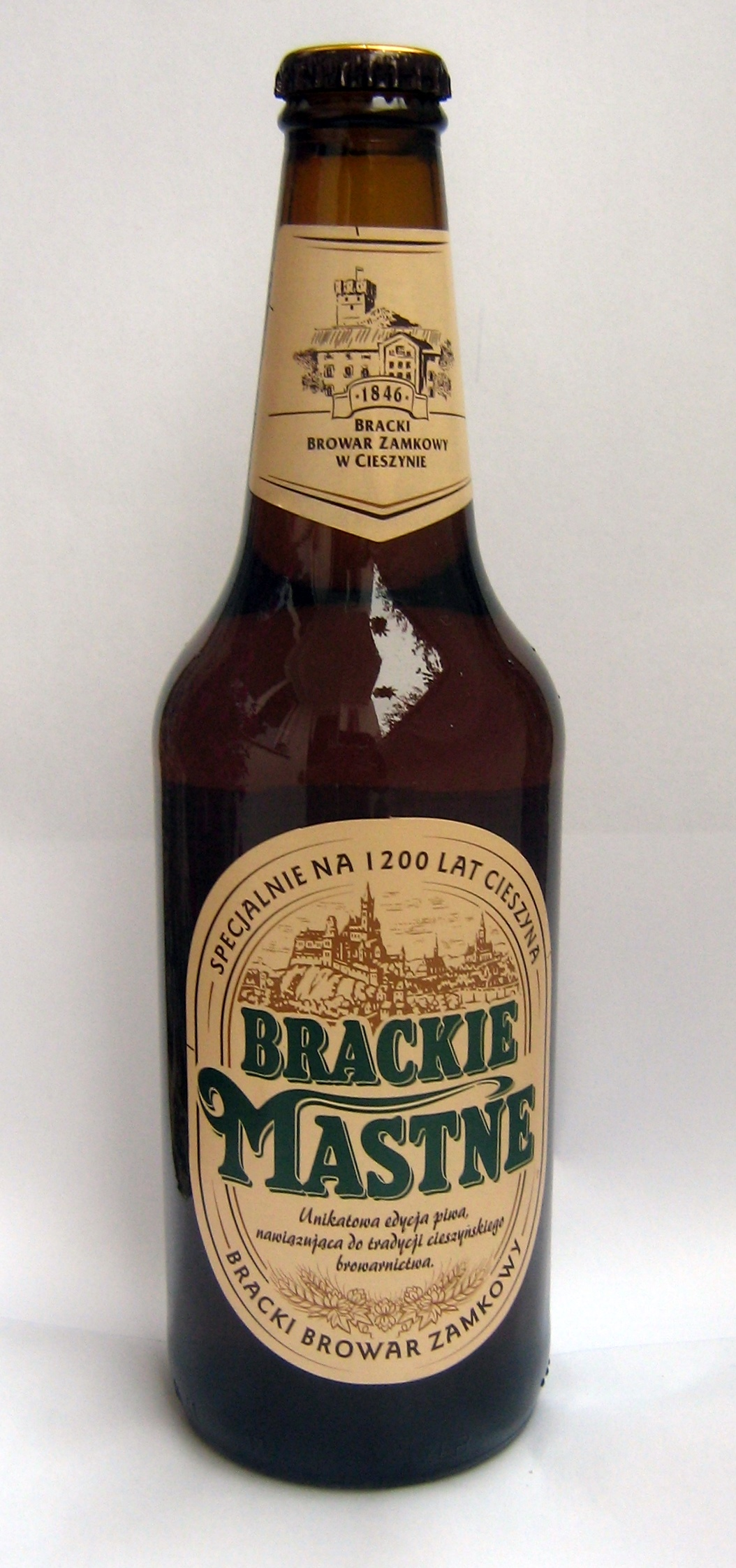 Piwo Brackie Mastne z Brackiego Browaru Zamkowego, uwarzone na obchody 1200 lecia Cieszyna w 2010 r.